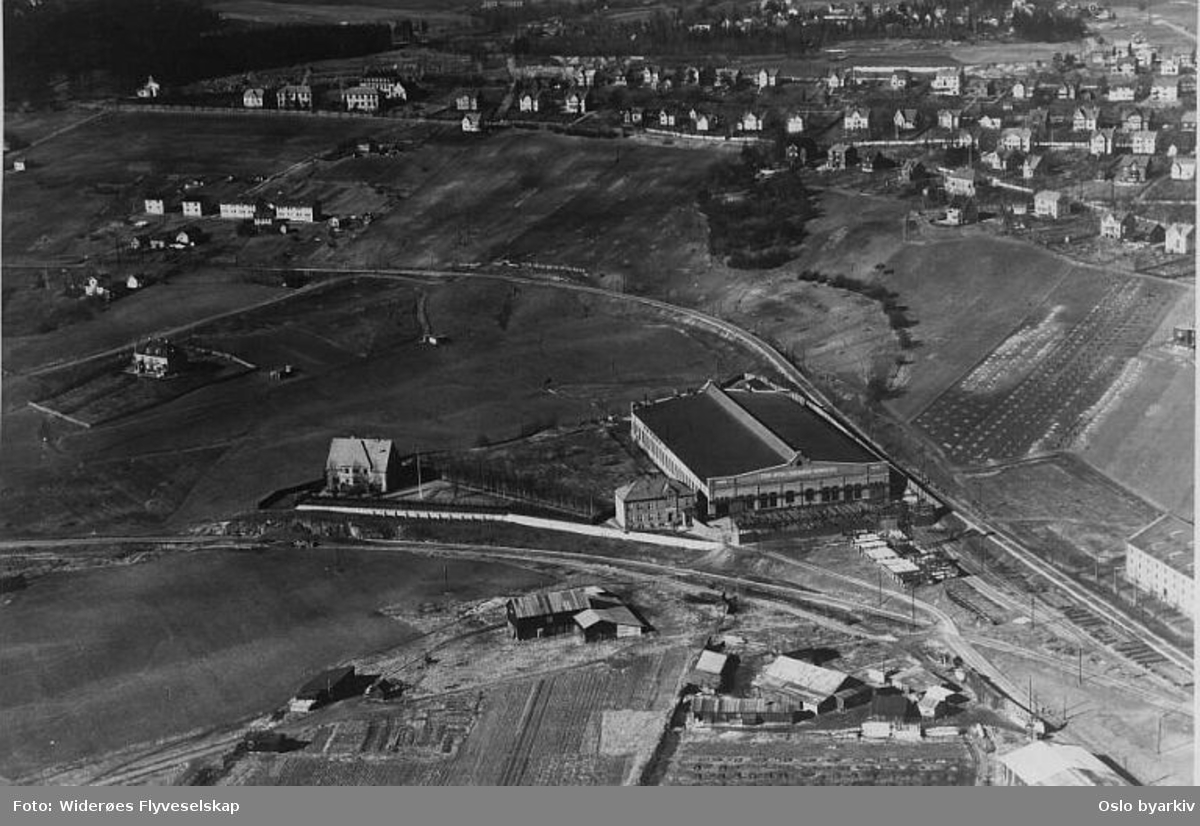 Erik Ruuds mekaniske Verksted, ca. 1950